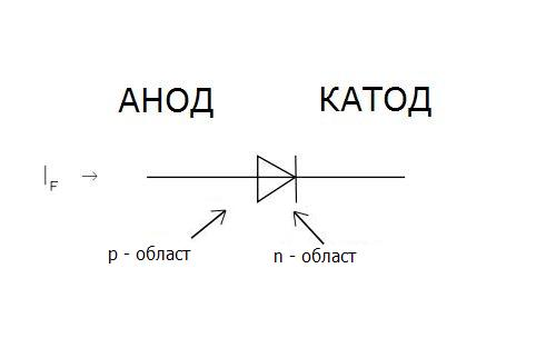 Схема на диод Diode symbol